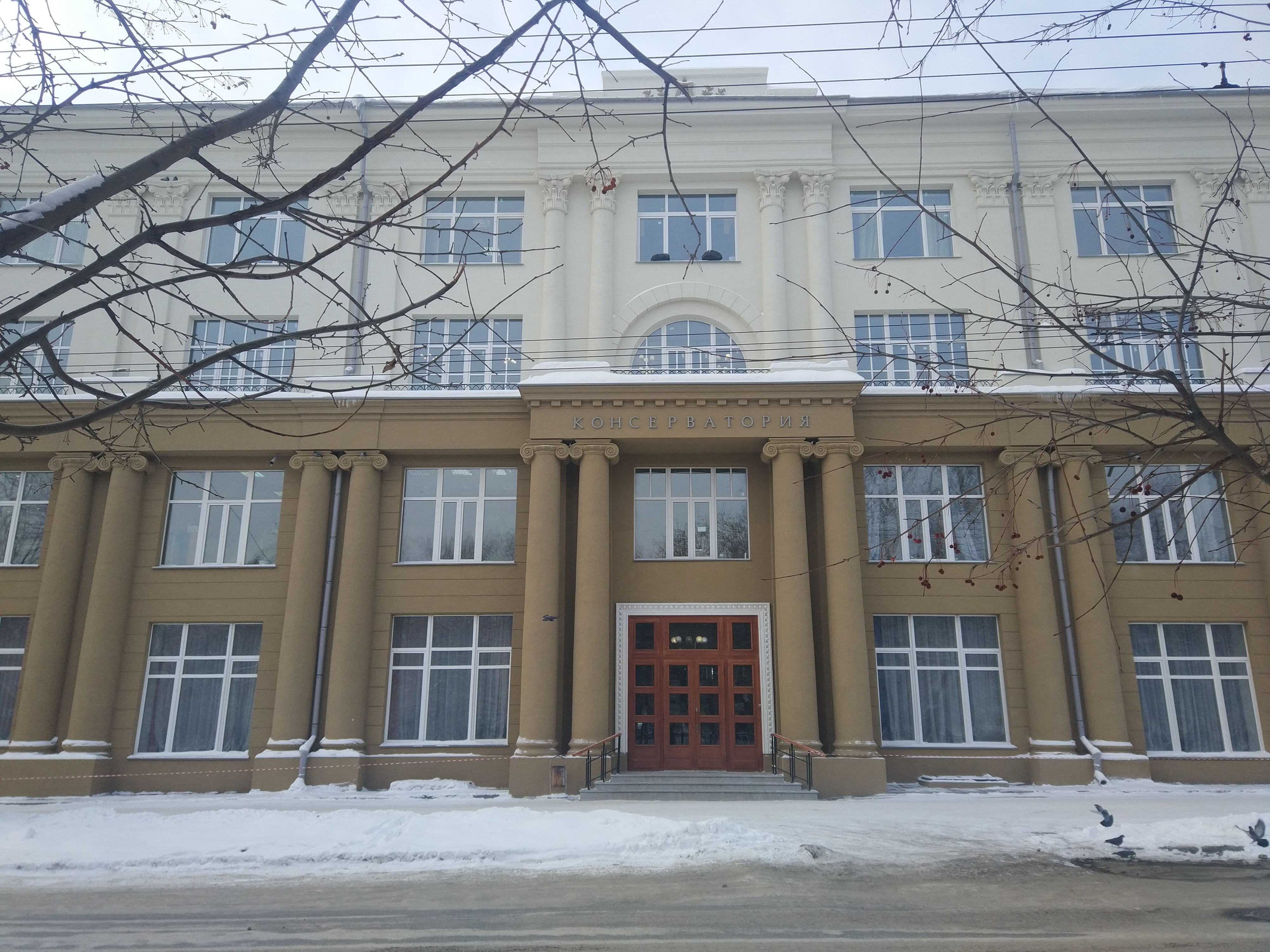 Новосибирская государственная консерватория имени М.И. Глинки